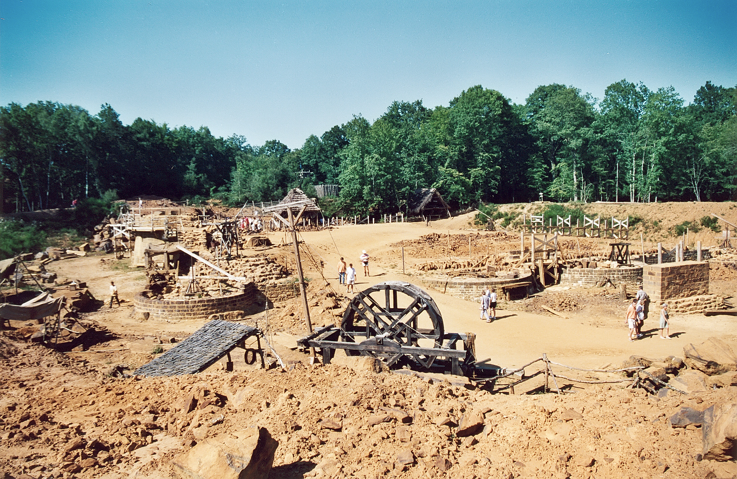 Château de Guédelon en 2000 Yonne France Photographie de Patrick GIRAUD